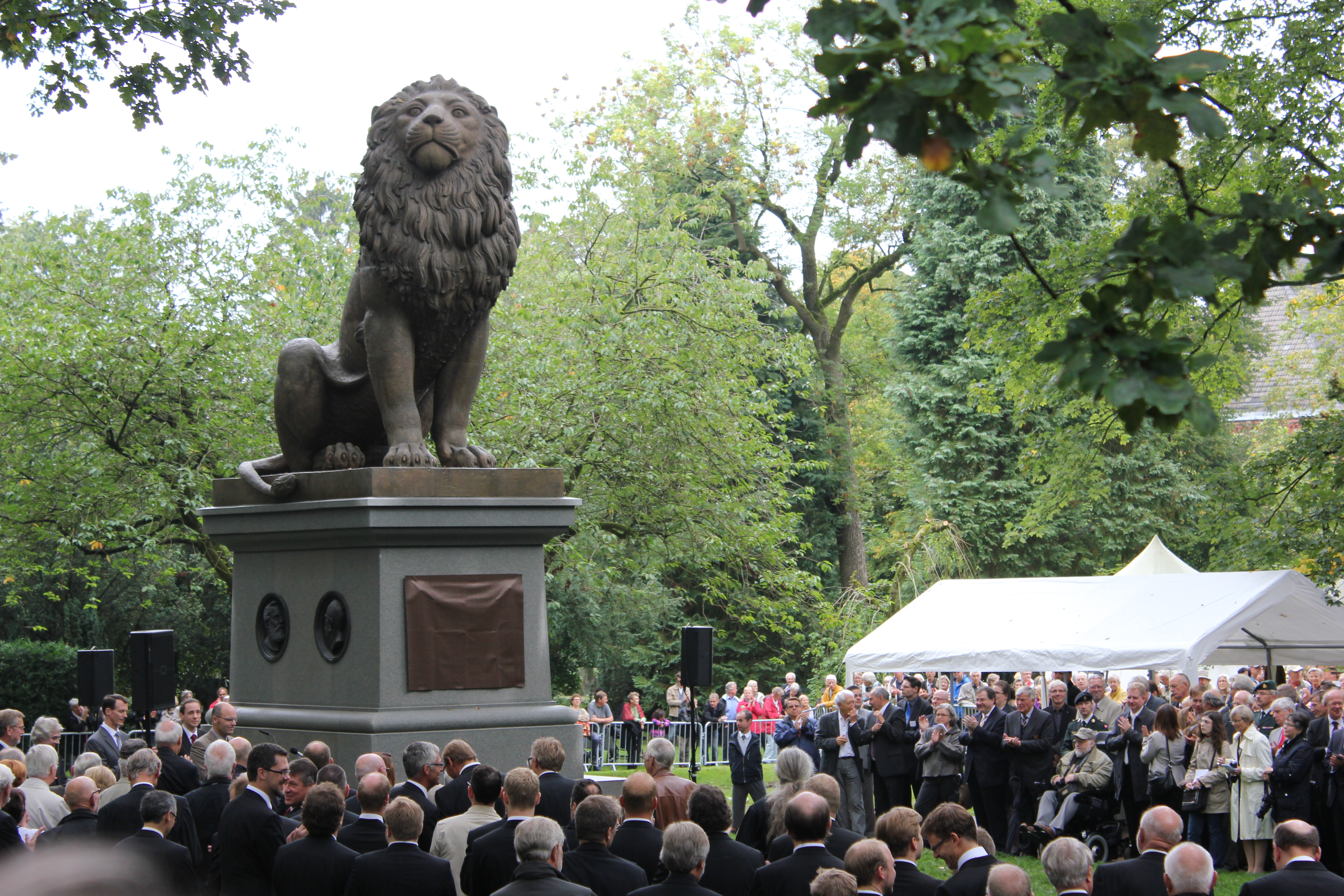 Flensburger Löwe (Einweihung, Redner Simon Faber)